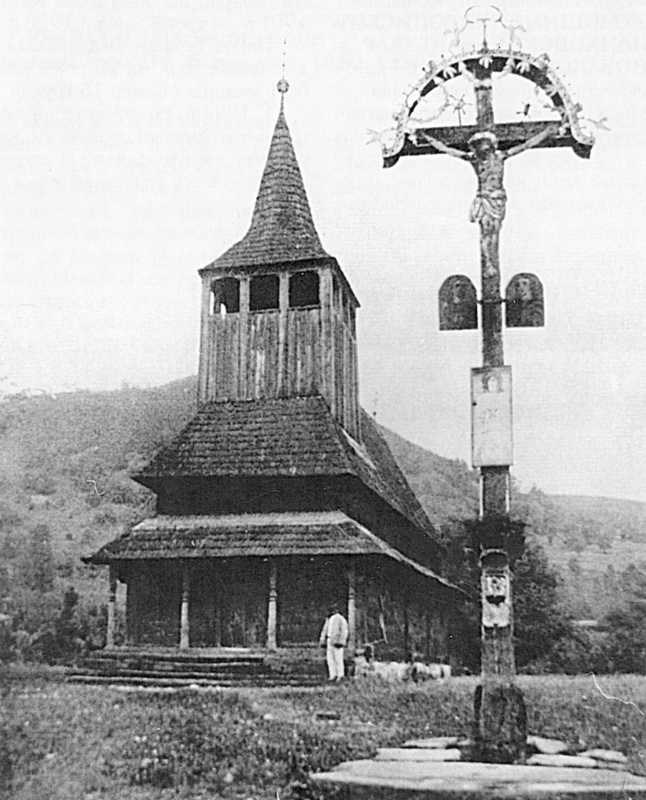 Церква св.Миколи, Терново